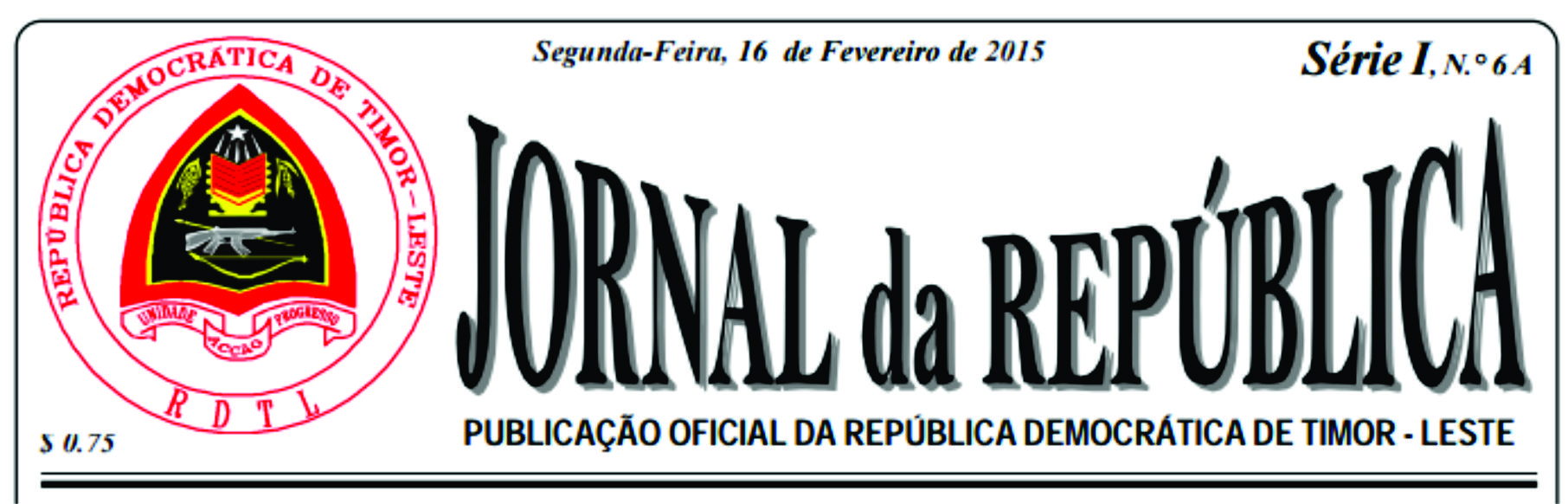 Logo frontispicial de uma edição do Jornal da República - o diário oficial ou boletim oficial de Timor-Leste.